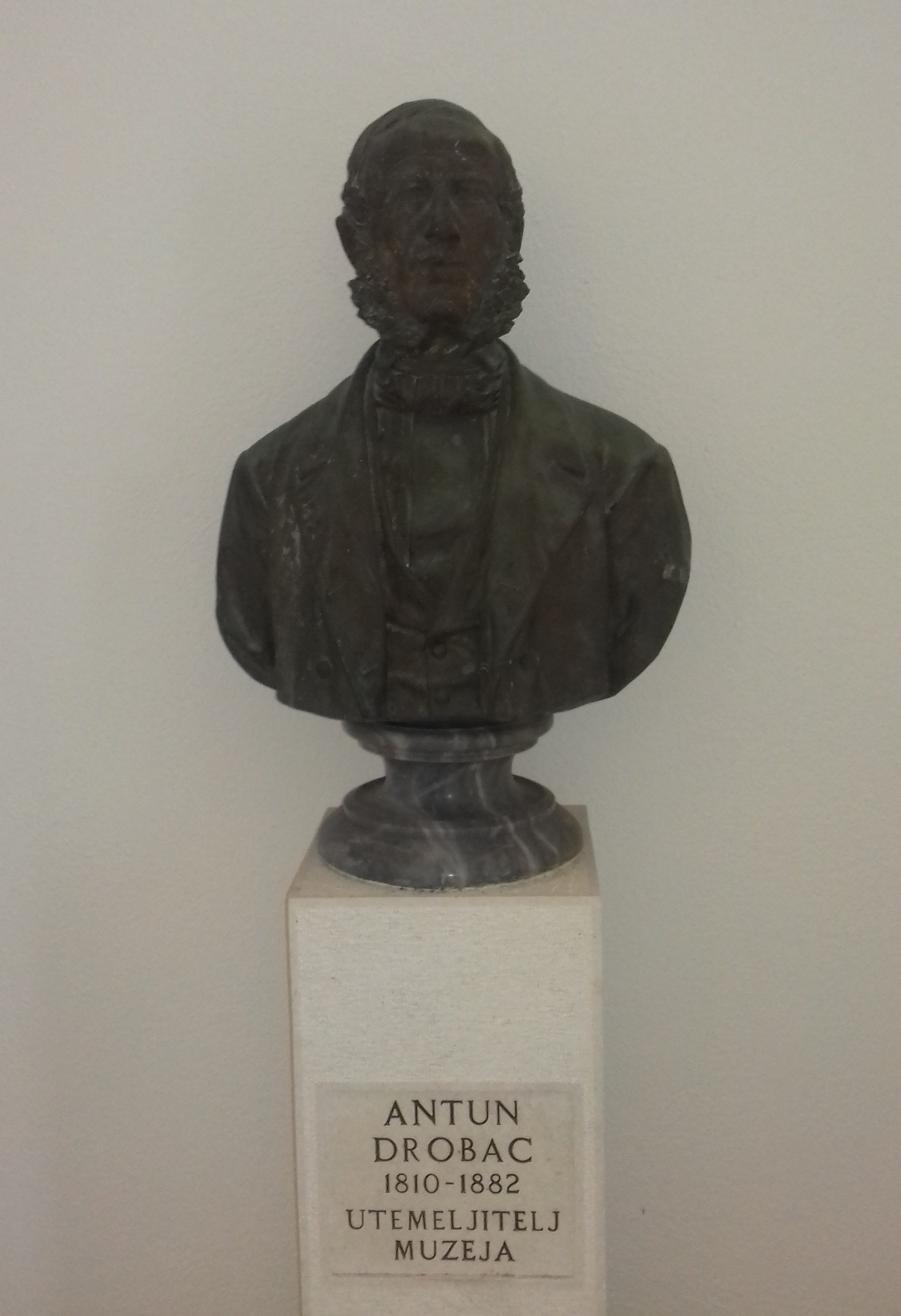 Brončana bista Antuna Dropca na ulazu u Prirodoslovni muzej Dubrovnik koju je 1885. u Trstu izradio Ivan Rendić